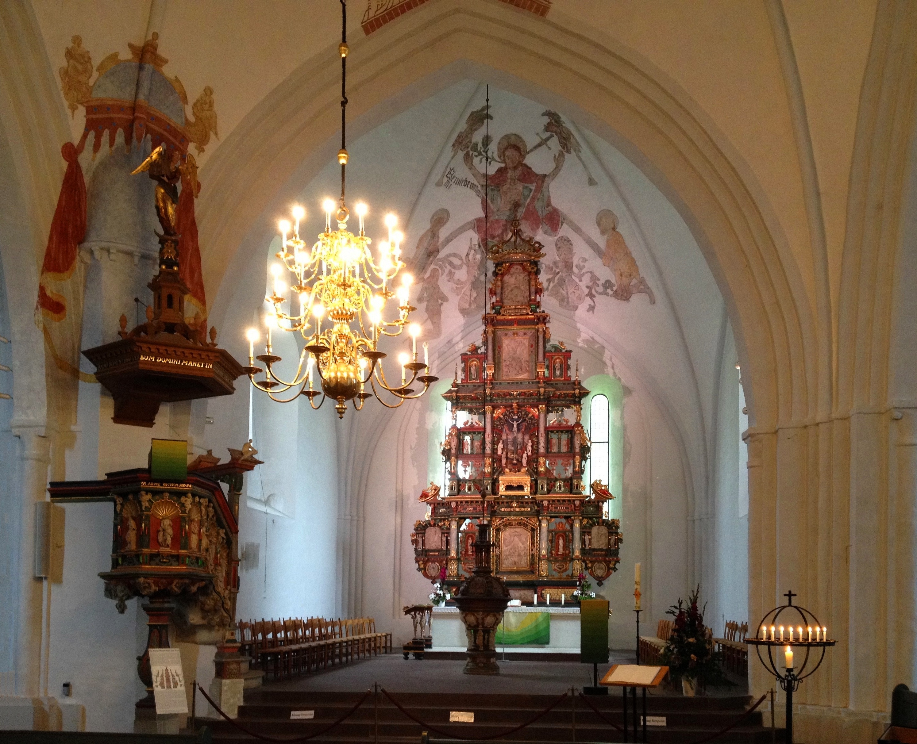 Varel, Schlosskirche, Inneres